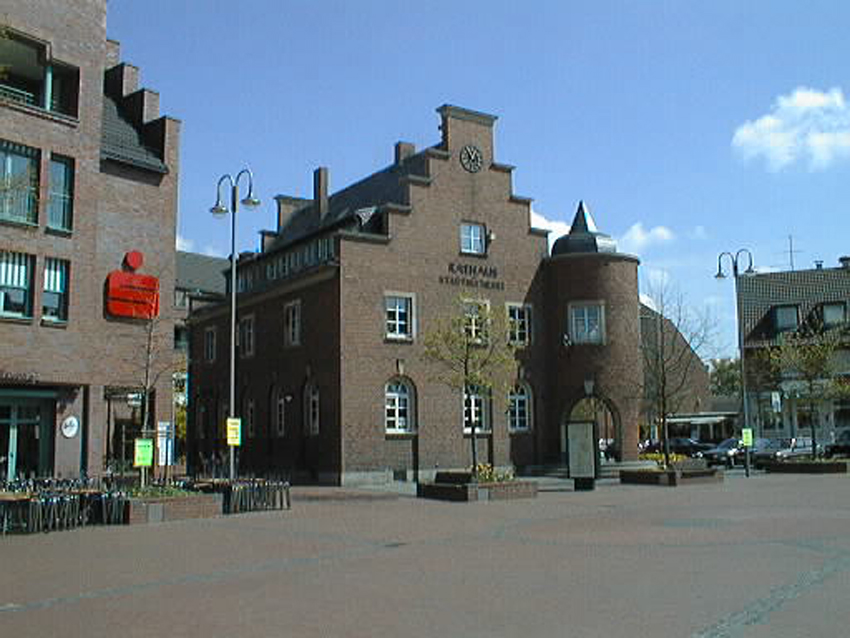 Altes Rathaus Pulheim This is a photograph of an architectural monument. /084